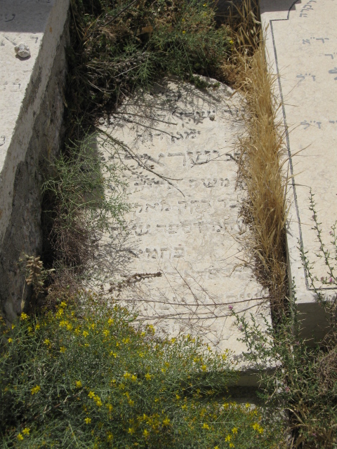 מצבת קברו של ר'